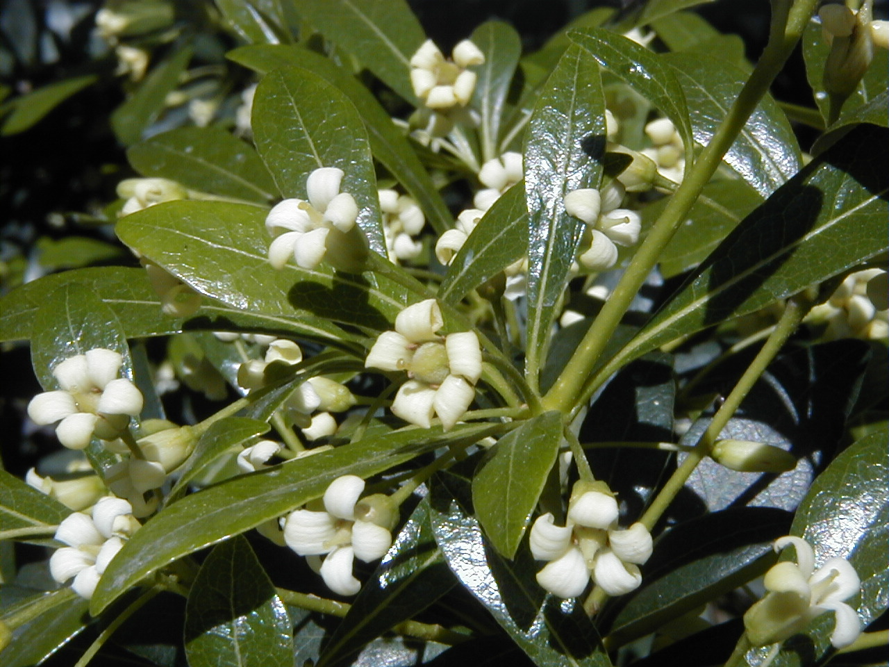 Pittosporum heterophyllum. Real Jardín Botánico, Madrid.